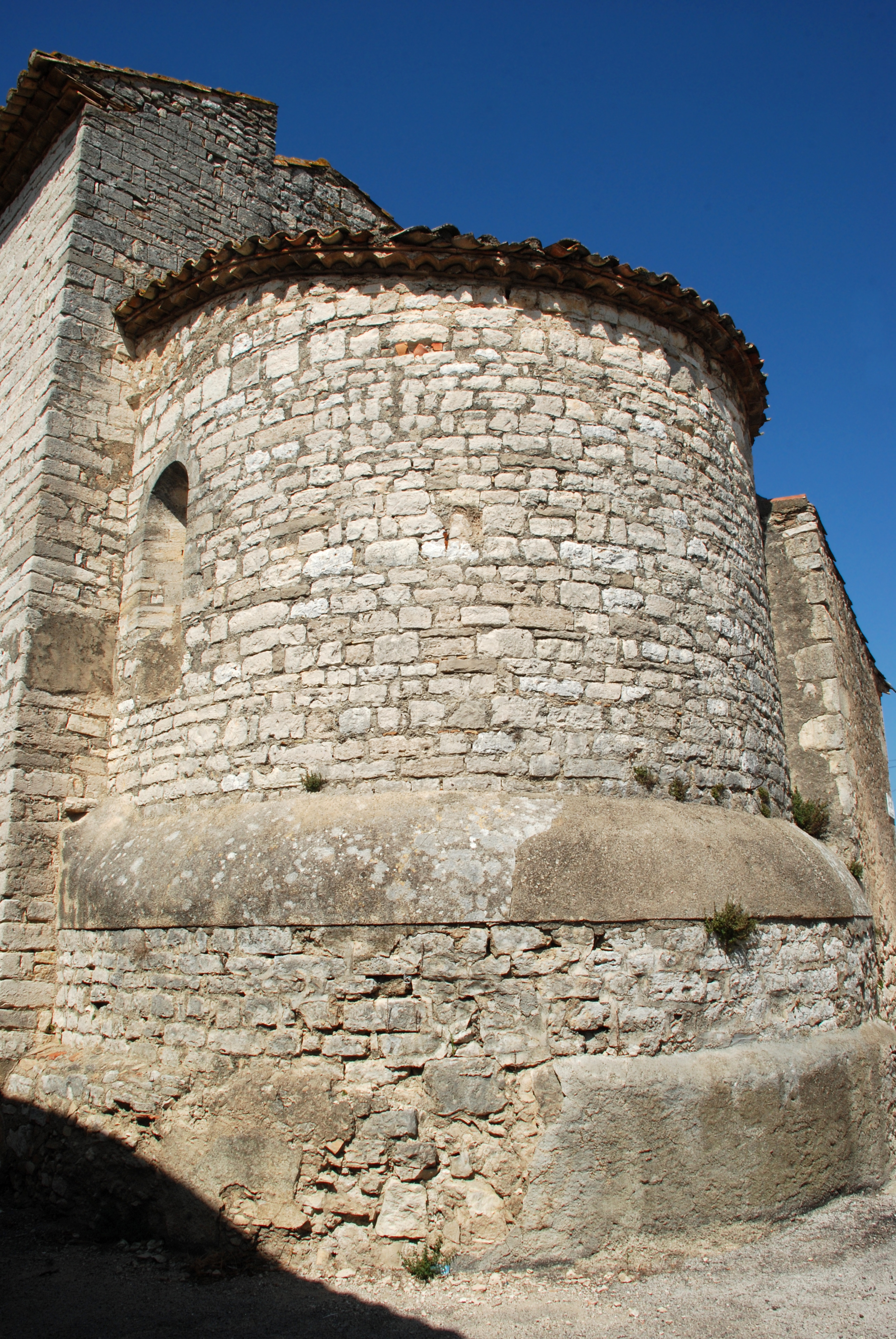 France - Hérault - Église Saint-Nazaire-et-Saint-Celse de Buzignargues